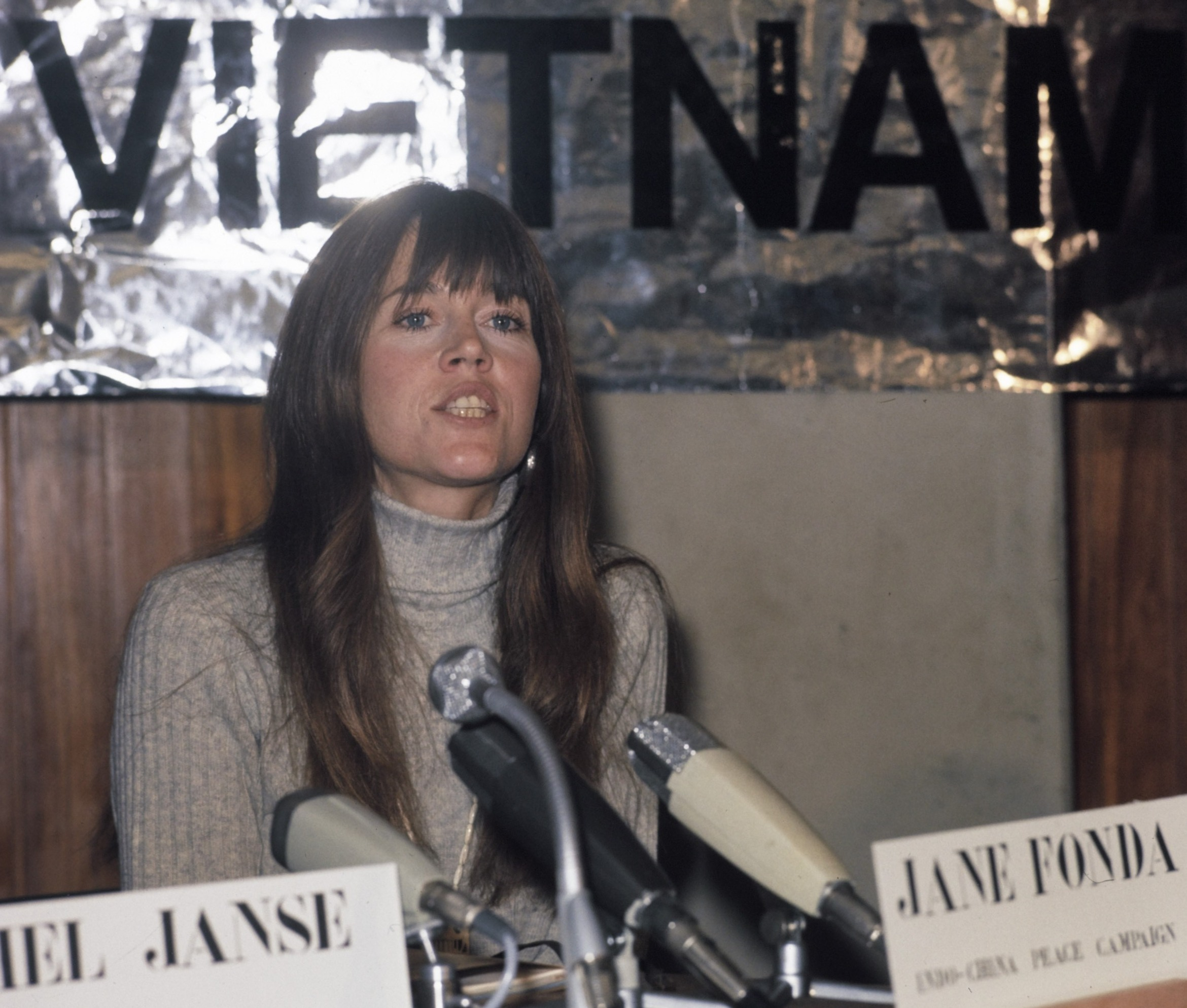 Vietnambijeenkomst in cultureel Centrum De Lindenberg te Nijmegen; Jane Fonda (actrice en Vietnamactiviste).